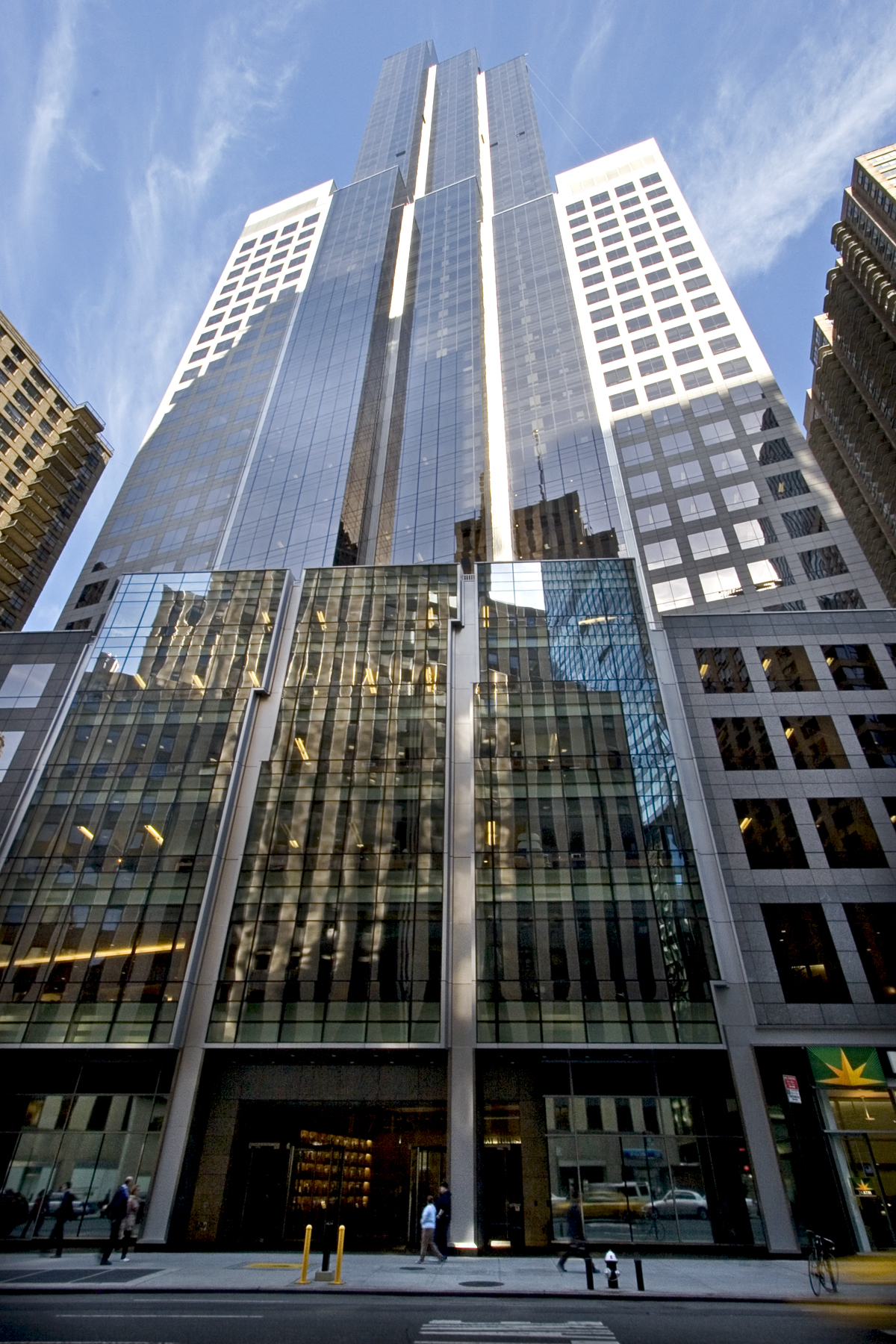 Penguin Random House Tower, 1745 Broadway, New York City